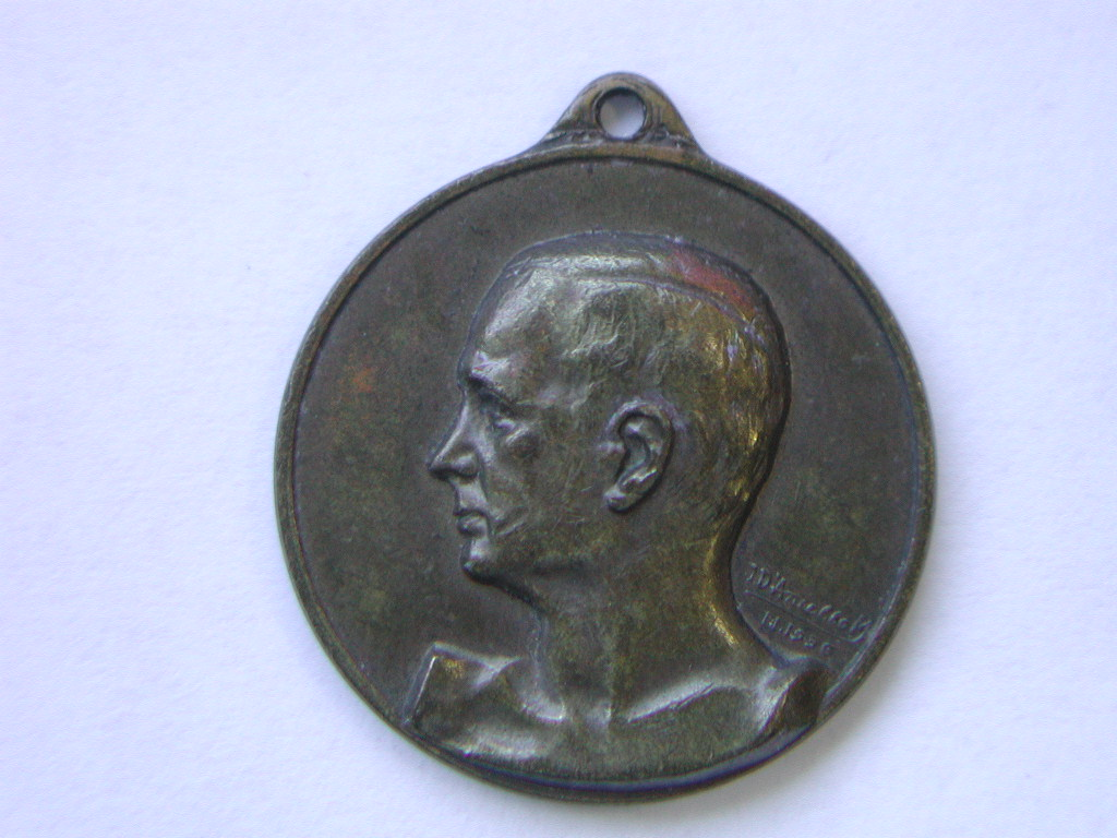 Medalla de puesta de piedra fundamental de presa y perfil del Dr. Gabriel Terra (Rincón del Bonete)